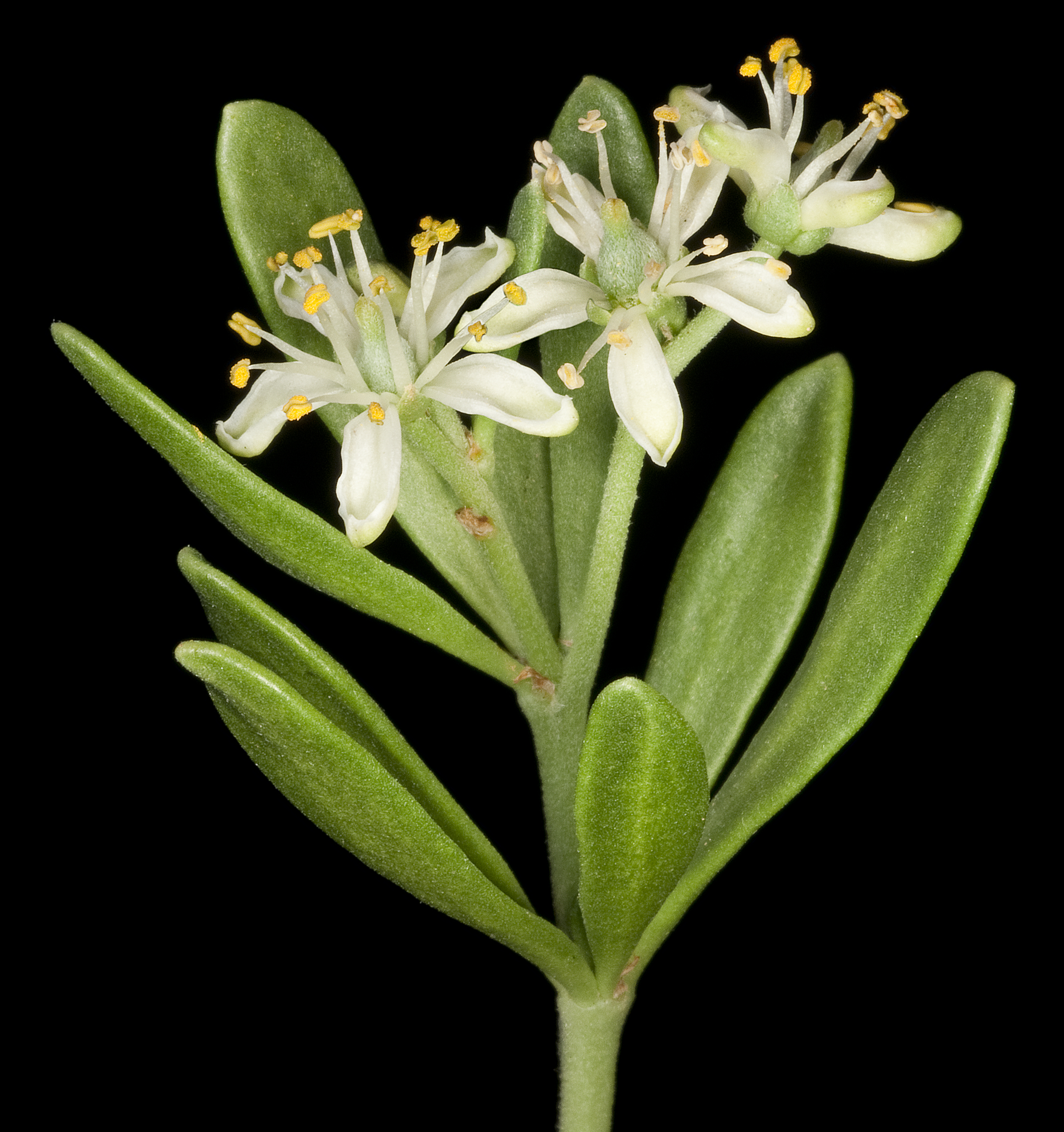 KRT4707